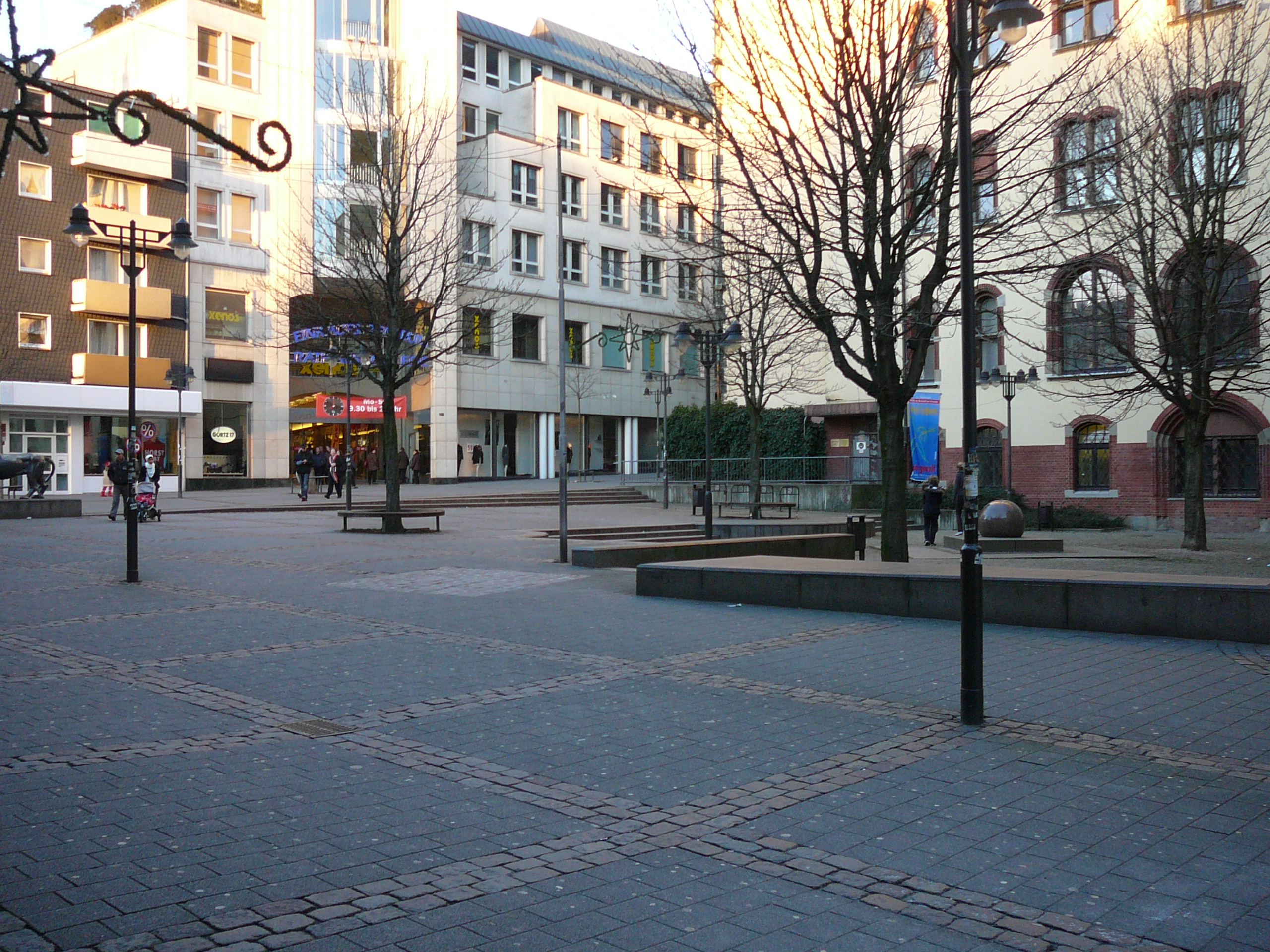 Neumarktstr, Wuppertal